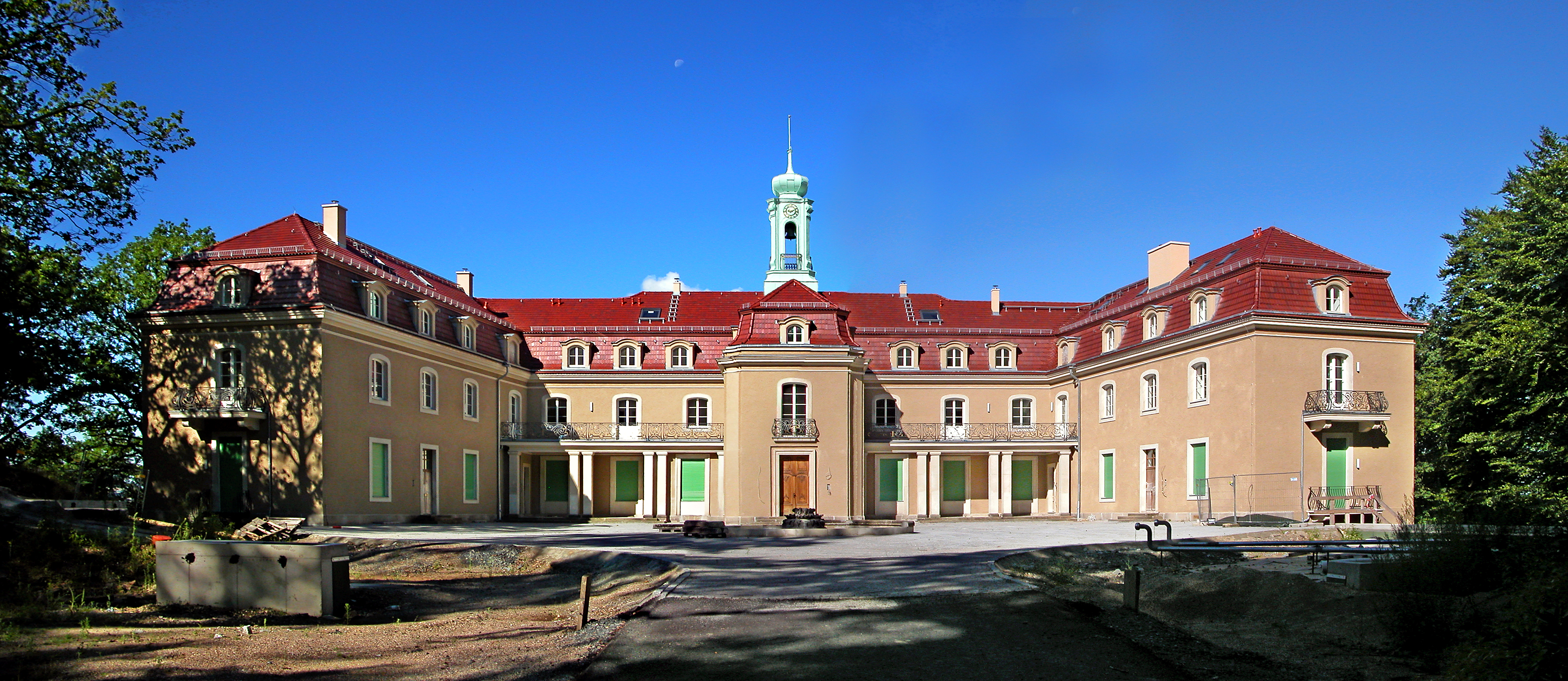 09.07.2012 Dresden-Wachwitz, Kotzschweg (51.046145,13.829167): Schloß Wachwitz (Oberwachwitz), Hofseite. Der Königliche Weinberg in Wachwitz geht auf Prinz Friedrich August zurück, der seit 1824 das Areal am Berghang aufkaufte. Dazu gehörte auch der Weinberg des Ritterguts Wachwitz. Im Gegensatz zu den Königsschlössern wurde nach dem Ende der Monarchie 1918 der Wachwitzer Weinberg als Privatbesitz des vormaligen Königshauses nicht enteignet. Prinz Friedrich Christian, der sich nunmehr Markgraf von Meißen nannte und nun in Dresden eine standesgemäße Unterkunft suchte, ließ sich auf dem Wachwitzer Weinberg 1936/37 ein Schloß errichten. Die Pläne erstellte das Dresdner Architekturbüro Lossow & Kühne, Josef von Lamatsch arbeitete die Pläne aus. Es wirkt wie ein Barockschloß aus vergangenen Zeiten. In der DDR-Zeit war hier ein Hotel des sowjetischen Ministeriums für Außenhandel, dann Sonderschule der FDJ und nach 1990 Tagungsstätte der Medizinischen Akademie "Carl Gustav Carus". Seit 1993 stand es leer. Nach der Wende forderte Maria Emanuel Markgraf von Meißen den Wachwitzer Weinberg für das Haus Wettin zurück, aber der Rechtsstreit ging zugunsten des Freistaates Sachsen aus. Seit 2006 gehört das Gelände der Dresdner Immobilienfirma WK. [DSCNn4270-4271.TIF]20120709030MDR.JPG(c)Blobelt